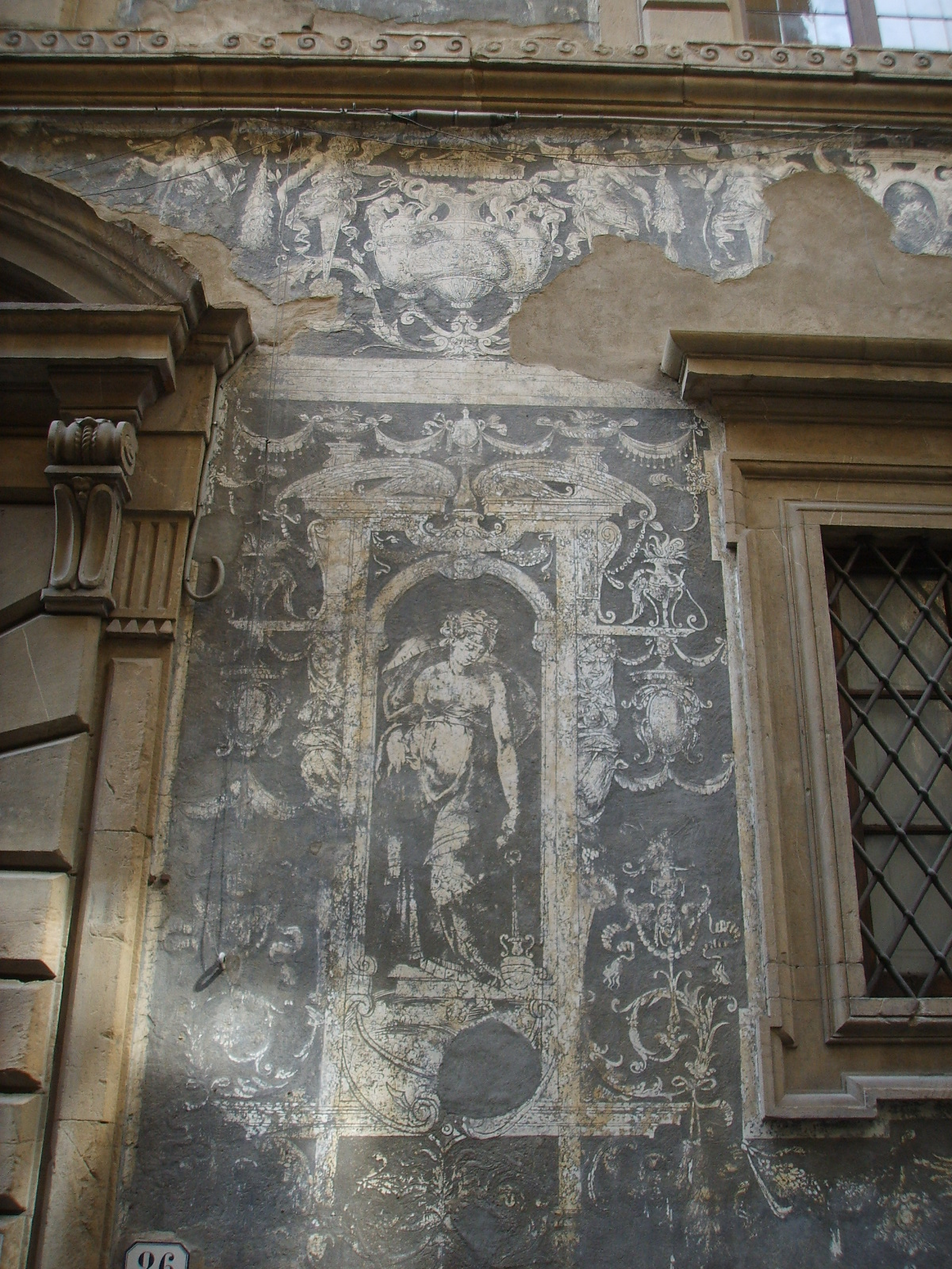 Palazzo ramirez de Montalto, graffiti di giorgio vasari